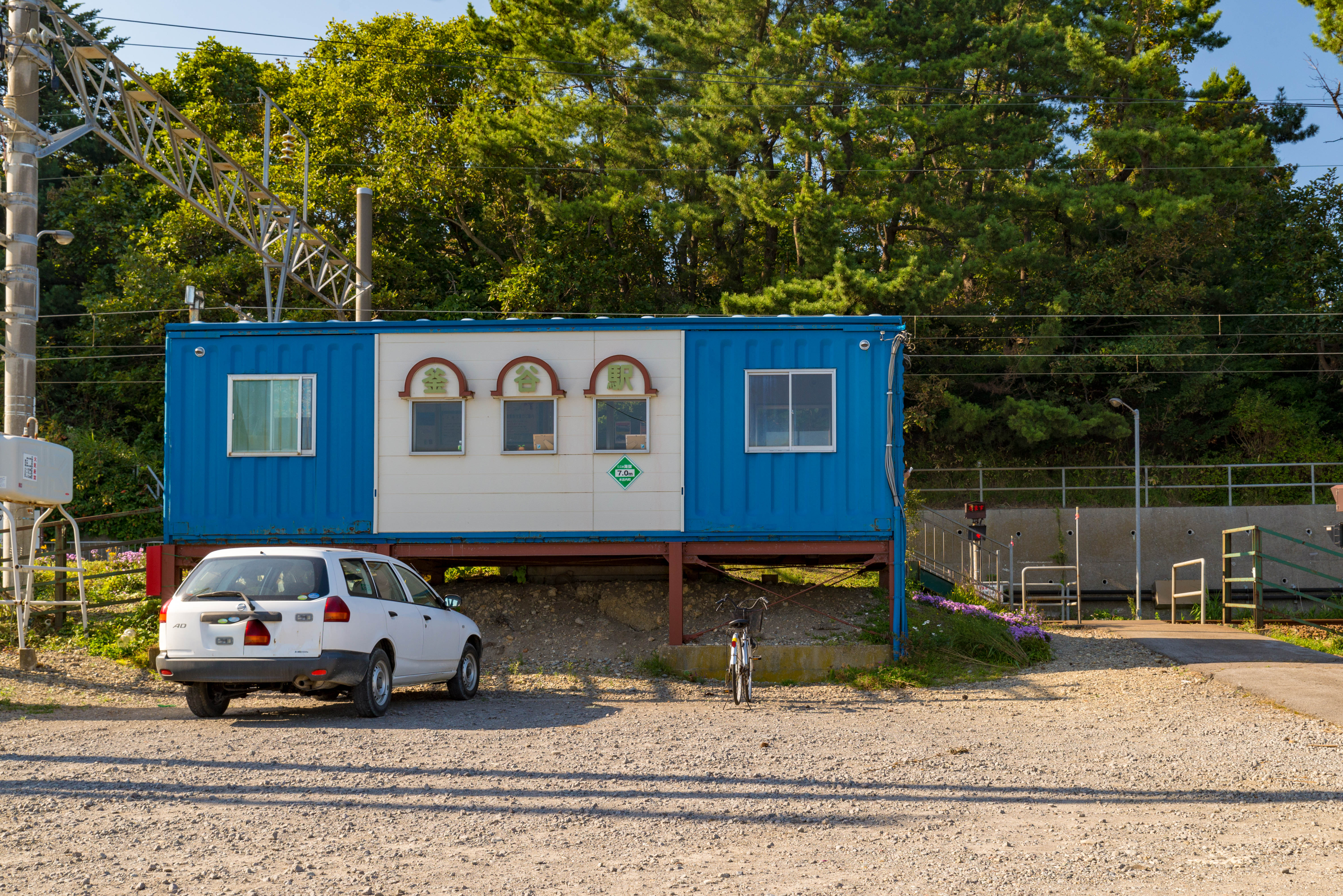 道南いさりび鉄道株式会社釜谷駅駅舎 （北海道旅客鉄道株式会社江差線釜谷駅駅舎）